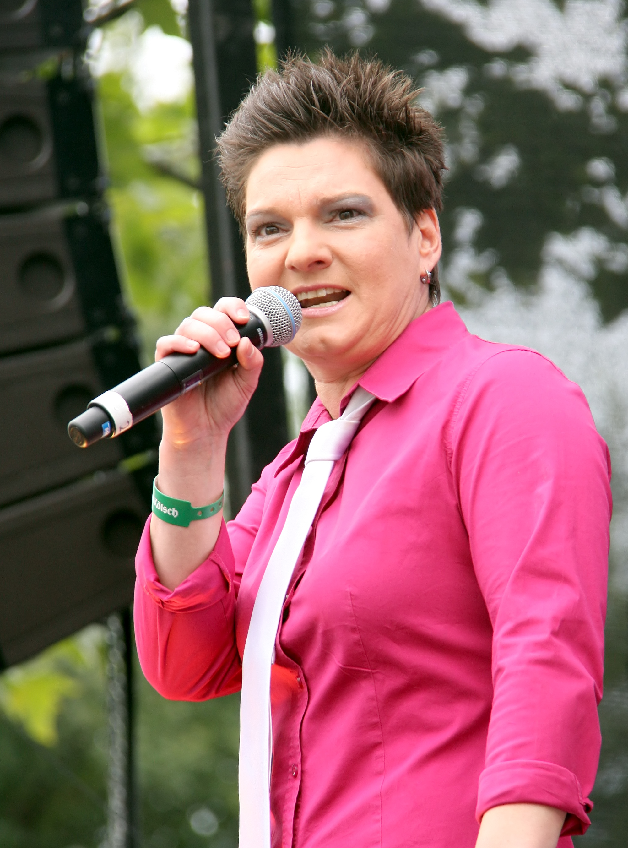 Vanessa Maurischat. Auftritt zusammen mit Holger Edmaier mit Ausschnitten aus ihrem Programm „Nacktbaden“. Bühnenprogramm zum CSD-Straßenfest/ColognePride 2011. Hauptbühne auf dem Heumarkt, Köln.